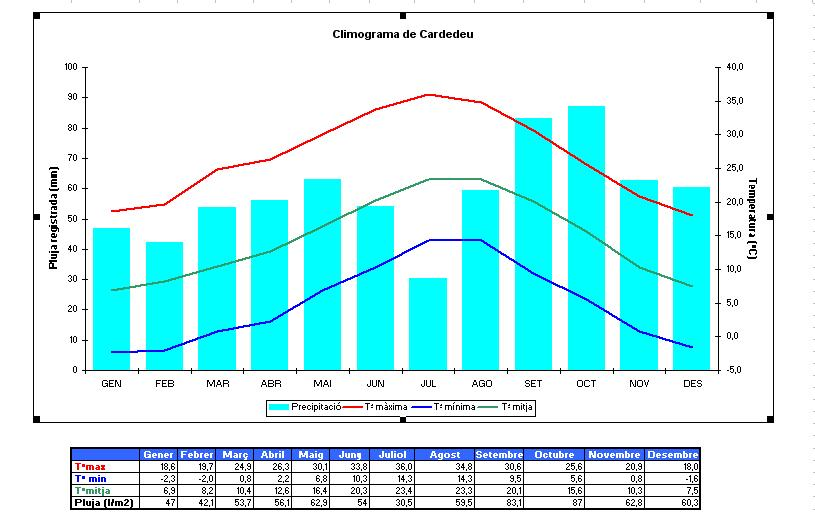 Climograma de Cardedeu fet gràcies a les dades que va anar recopilant durant molts anys en Pere Comas de Cardedeu. La temperatura mitja i les precipitacions són des de l'any 1951 fins al 2003. Les temperatures mitges màximes i mínimes són des de l'any 1992 fins al 2003. "El temps a Cardedeu" per Pere Comas. Es pot trobar a la Biblioteca Marc de Vilaba de Cardedeu. En Roger Porta i Alabau ha buscat la informació i en Claudi Fitó i Díez i en Miquel Colomer i Herrero han fet el gràfic.